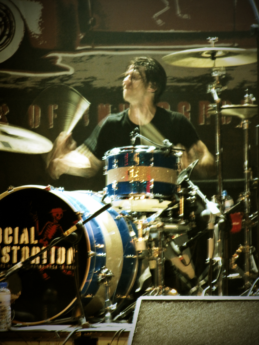 Sala La Riviera, Madrid - España. 4 de Junio de 2009 Más, mucho más en